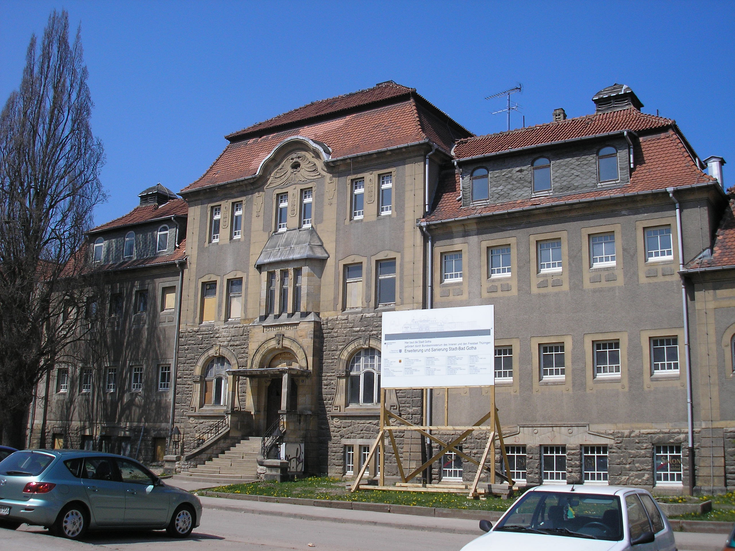 Das ehemalige Stadtbad in Gotha (Thüringen).